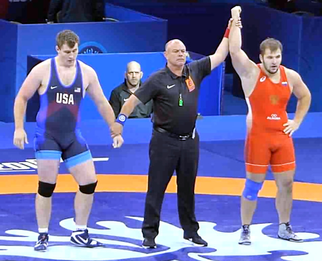 Финальная схватка Сергея Семенова с Адамом Куном (США) на чемпионате мира по борьбе 2018 года в Будапеште